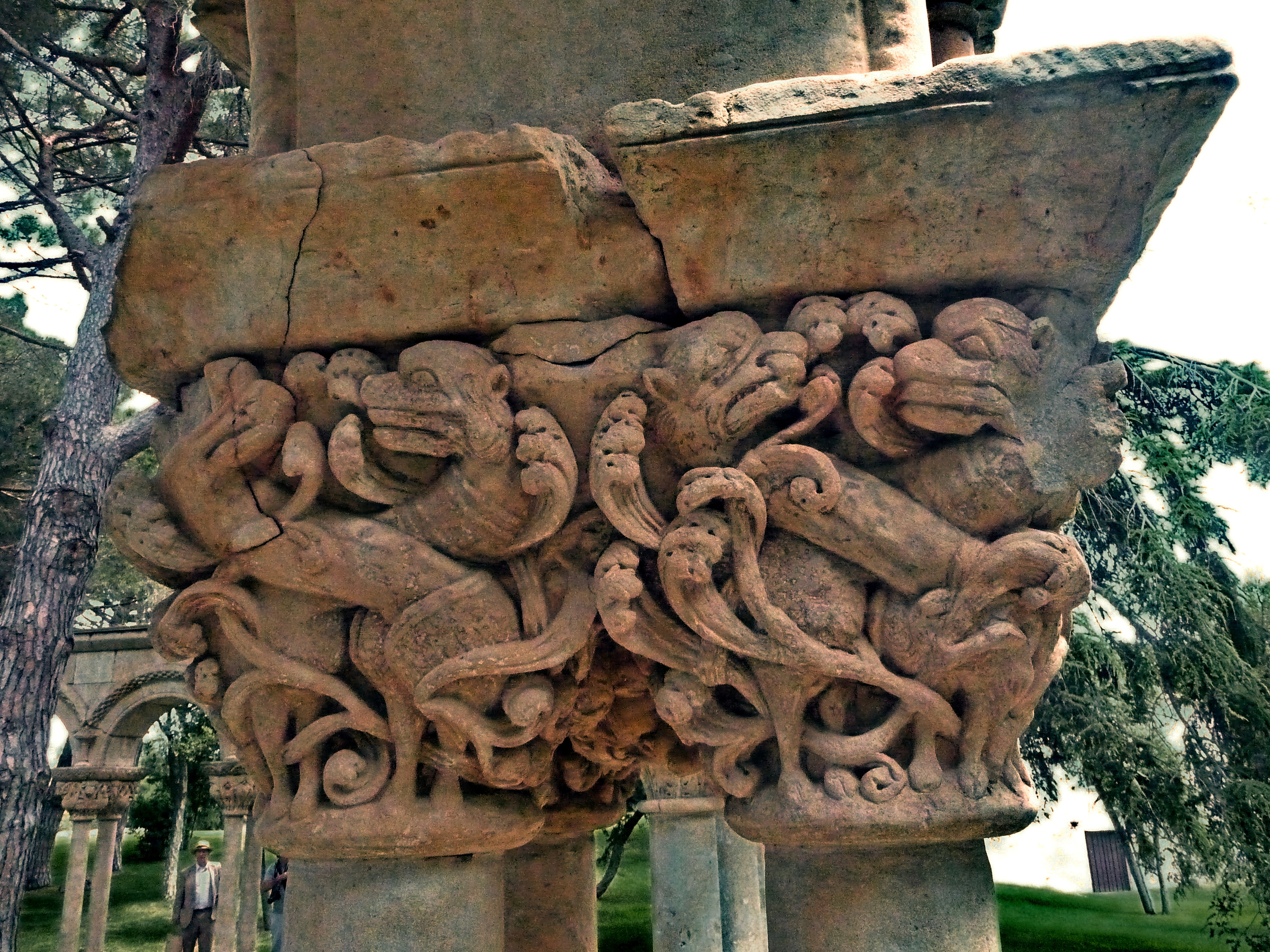 Claustre romànic del Mas del Vent de Palamós